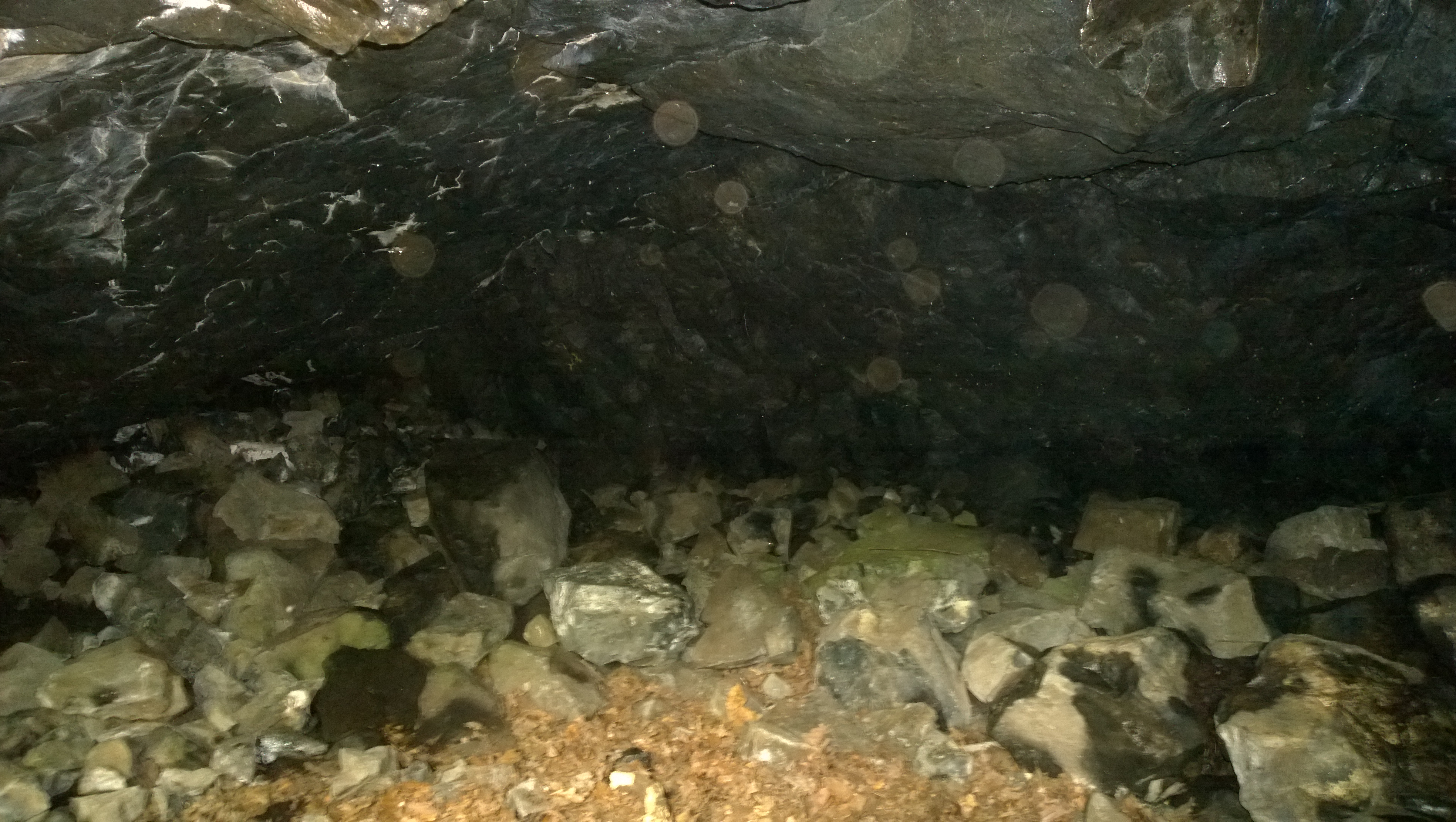 Die Teufelskeller Höhle am Gangolfsberg (Oberelsbach) Innen